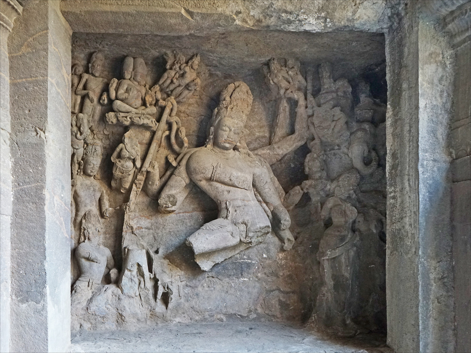 « Shiva Nataraja, grotte n°1. La sculpture représente Shiva effectuant la danse cosmique (Tandava). En bas, à gauche, et à droite, Parvati est également représentée. On peut aussi reconnaître autour de Shiva, Ganesh, Indra sur sa monture (éléphant) et Vishnou sur Garuda. Les Grottes d'Elephanta sont situées en Inde occidentale, sur l'île d'Elephanta (appelée aussi île de Gharapuri), qui est constituée de deux monticules séparés par une vallée étroite. La petite île est parsemée de nombreux vestiges archéologiques qui sont les seuls témoignages de son riche passé culturel. Ces vestiges archéologiques révèlent des traces d'occupation humaine dès le IIe siècle av J.-C. Les Grottes rupestres d'Elephanta ont été aménagées entre le milieu du Ve et le VIe siècle après J.-C. extrait du site sur le patrimoine mondial de l'UNESCO